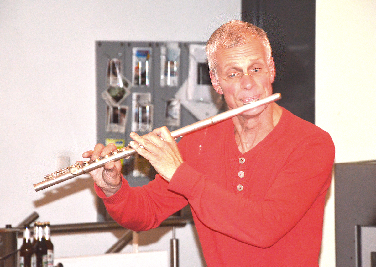 Eckhart Liss, Geschäftsführer und künstlerischer Leiter des Vereins Kunst und Begegnung Hermannshof e.V., hier in dem Neubau auf dem Kulturdenkmal Hermannshof beim Spiel mit der Querflöte vor den Besuchern des Freundeskreises Hannover ...